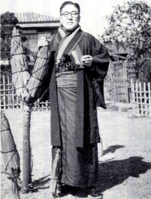 写真をスキャン